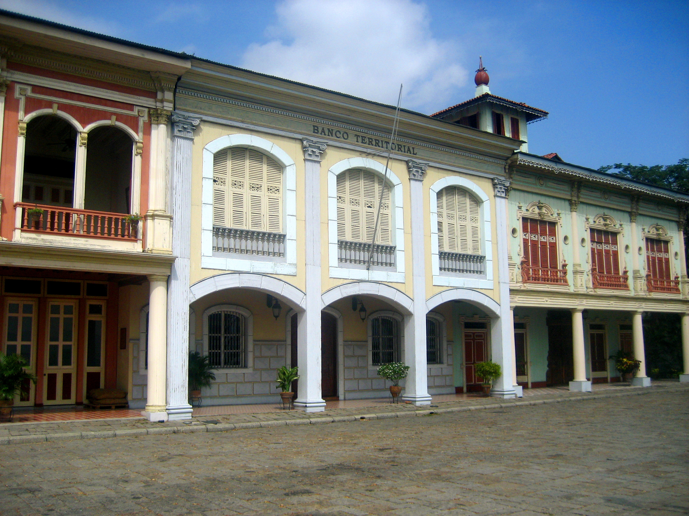 Foto del Banco Territorial en el Parque Histórico Guayaquil